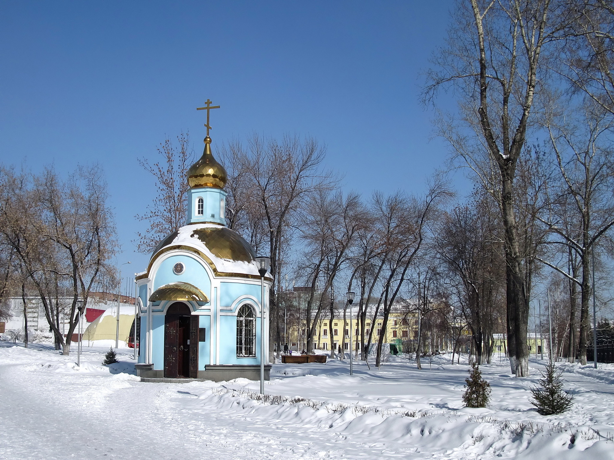 Часовня Успения Божией Матери